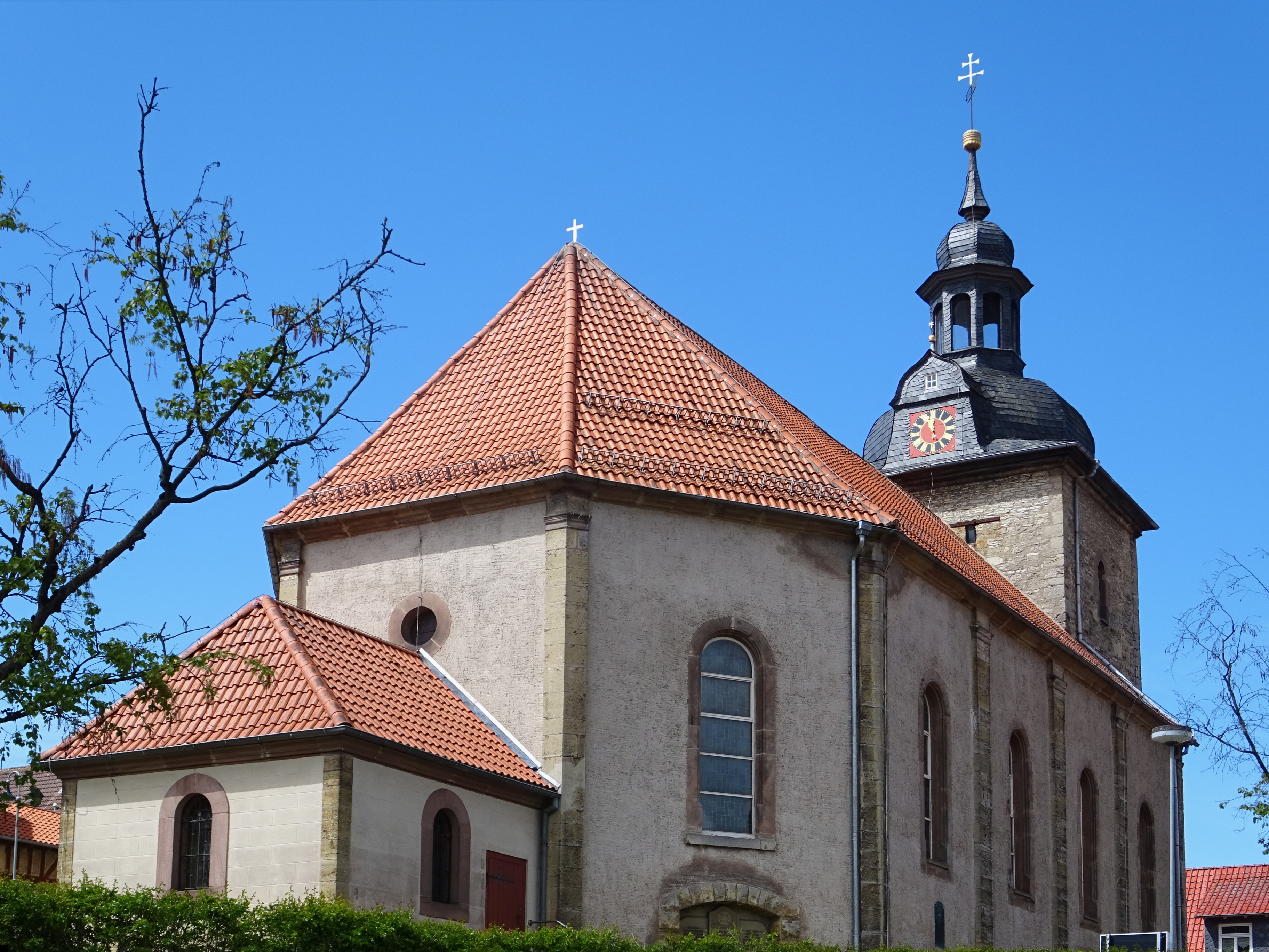 Dorfkirche St. Sergius und Bacchus in Kreuzebra von Osten